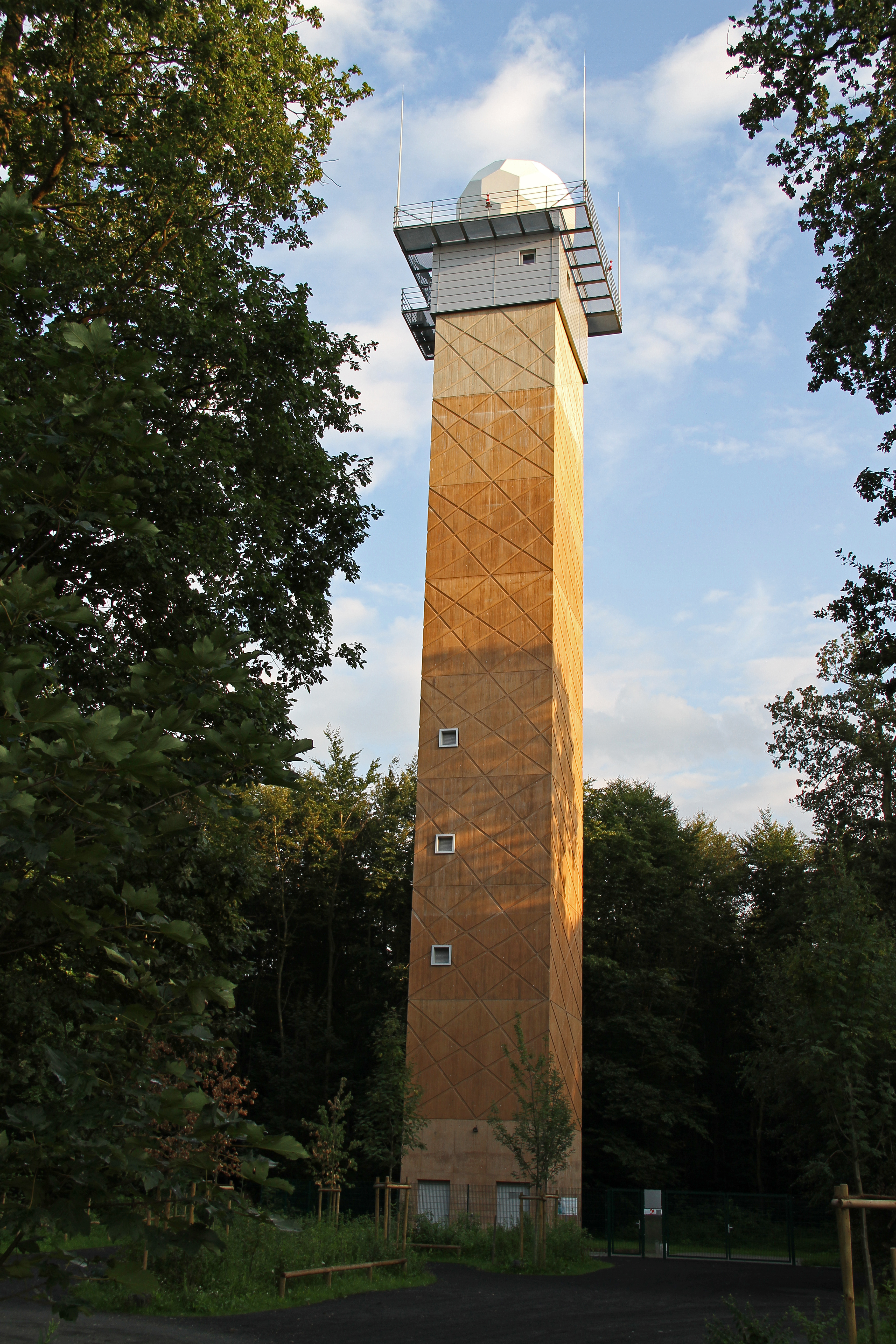 Wetterradarstation des Deutschen Wetterdienstes DWD in Dreieich-Offenthal. Infotafel am Turm des DWD: Dies ist eine Wetterradarstation des Deutschen Wetterdienstes. Sie ist Teil des Radarverbunds, der die gesamte Bundesrepublik Deutschland überdeckt. Auf der Spitze des Turmes befindet sich, vor Wettereinflüssen durch ein Radom geschützt, die Antenne. Die Antenne empfängt den Teil der ausgesendeten Impulse, der von Tröpfchen mit mehr als 0,1mm Durchmesser reflektiert wird. Aus der Laufzeit und Intensität des empfangenden Signals erhalten die Meteorologen des Deutschen Wetterdienstes Informationen über die Intensität und Zugrichtung der Niederschlagsfelder. Die einzelnen Bilder seiner Wetterradarstationen setzt der DWD zu einem Gesamtbild der Bundesrepublik zusammen. Die Informationen gehen in den Wettervorhersagedienst ein, dienen der Warnung vor Starkniederschlägen und Unwettern, unterstützen Beratungen der Land- und Forstwirtschaft sowie der Wasserwirtschaft.